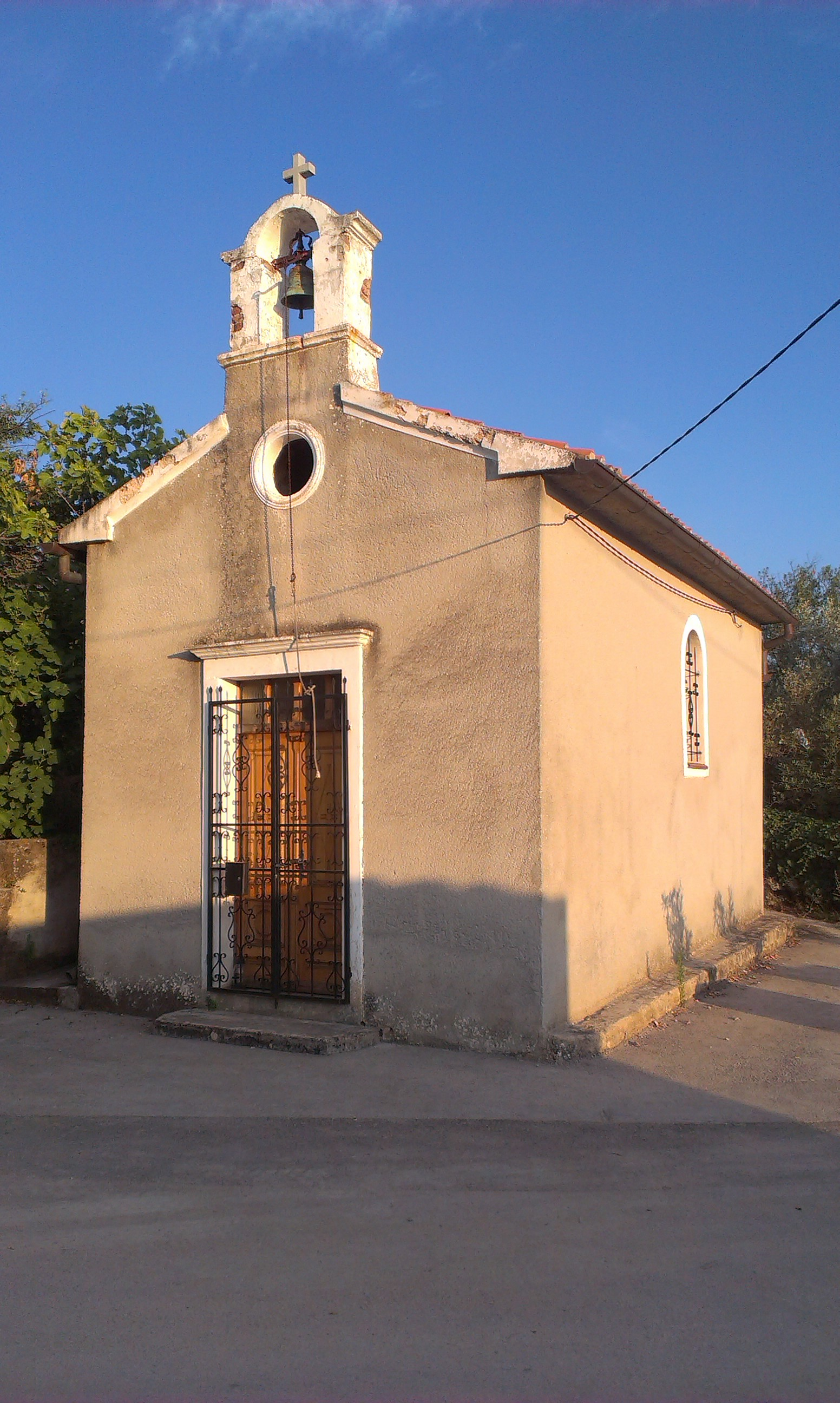 Cerkev Svetega Klemna v kraju Klimno na hrvaškem otoku Krk